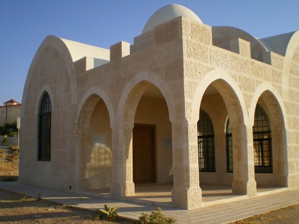 المبنى من الداخل